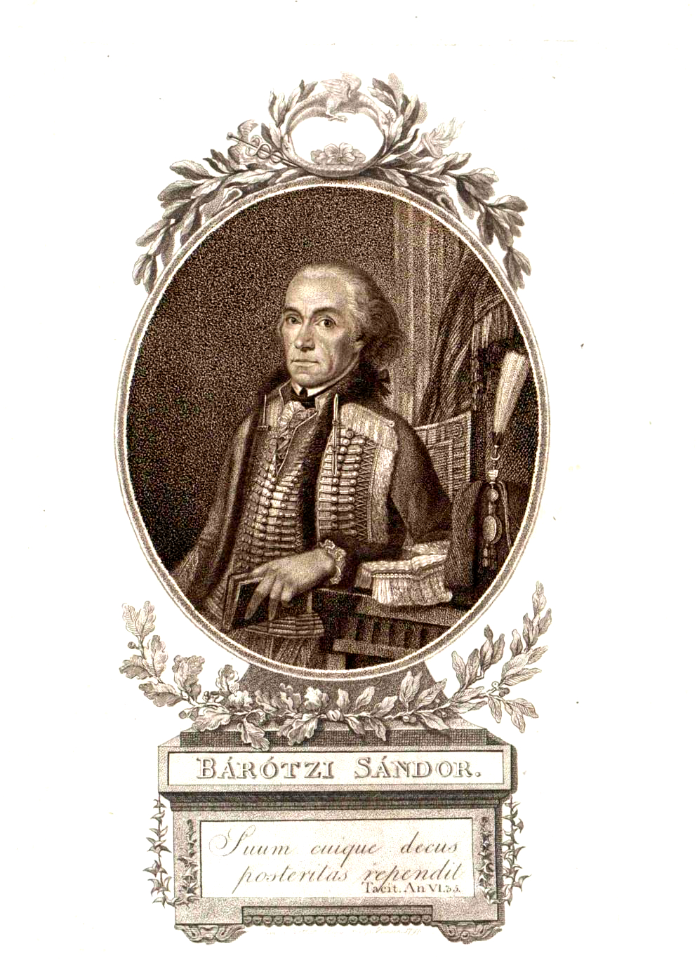 Báróczi, Sándor (1735 - 1809) (Ispánlaka (Șpălnaca), 1735. április 11. – Bécs, 1809. december 24.) magyar királyi testőr, író; a testőrírók közé tartozott.